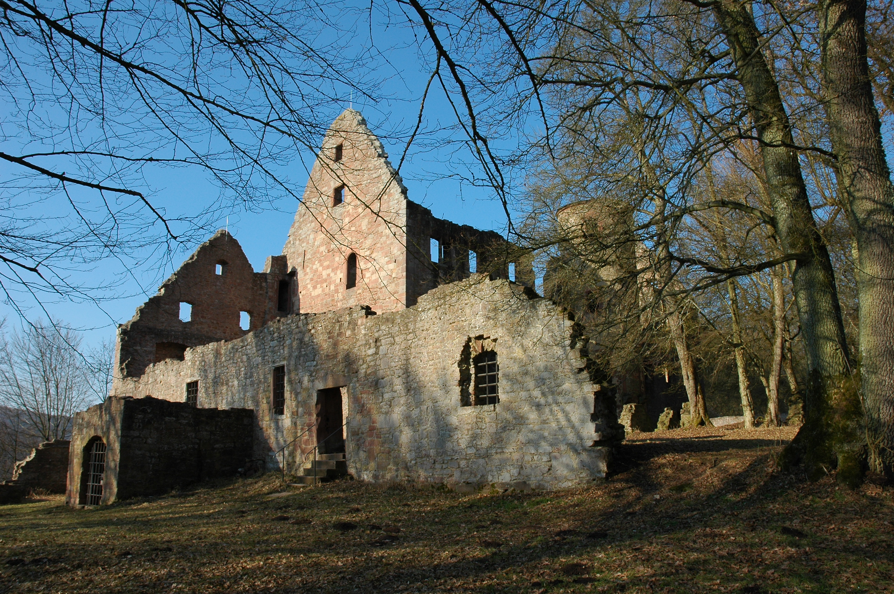 Ruine Schönrain am Main. Blick von Süd-Osten auf den noch aus hirsauer Zeit stammenden Teil der einstigen Klosteranlage. Hauptgebäude ist der Rest des ehemaligen Wohnschlosses der letzten Grafen v. Rieneck